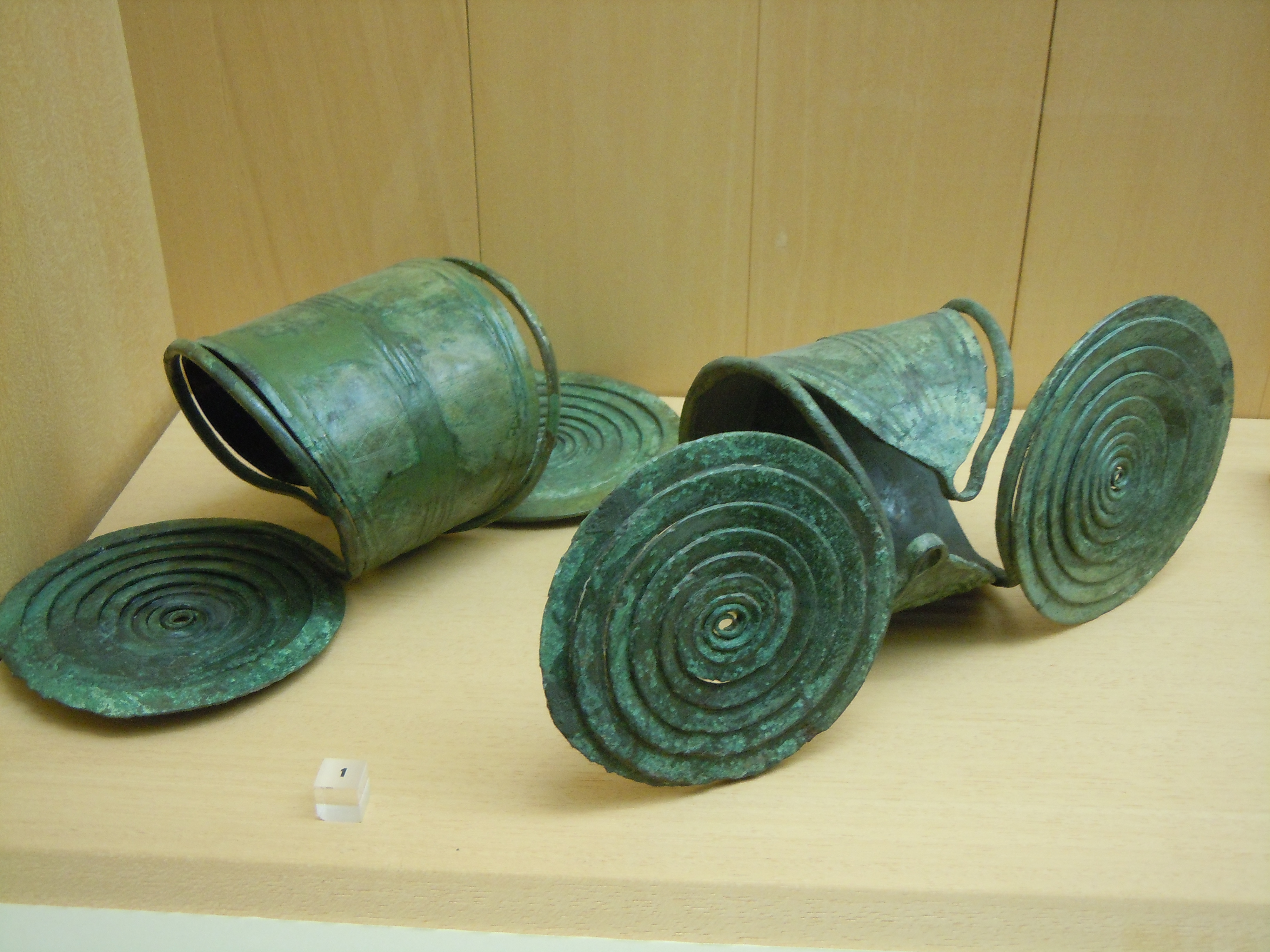 Jambières en bronze - Age du Bronze - 1250 av JC - Veuxhaulles-sur-Aube - Musée des Antiquitées Nationales de Saint Germain en Laye- France